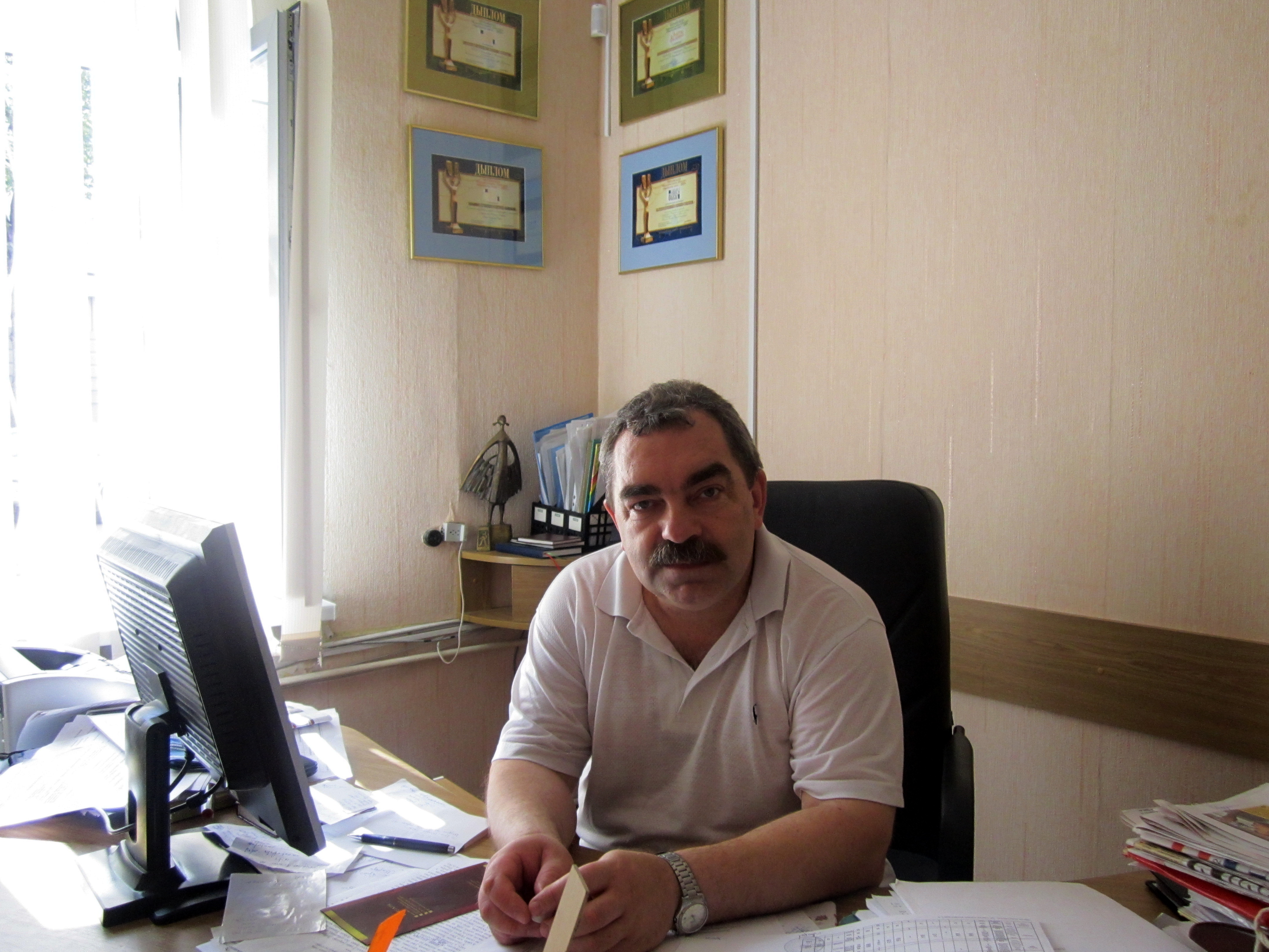 Алесь Бадак. Беларускі пісьменнік, паэт-песеннік, публіцыст, крытык. На працоўным месцы, намеснік дырэктара РВУ Выдавецкі дом «Звязда».